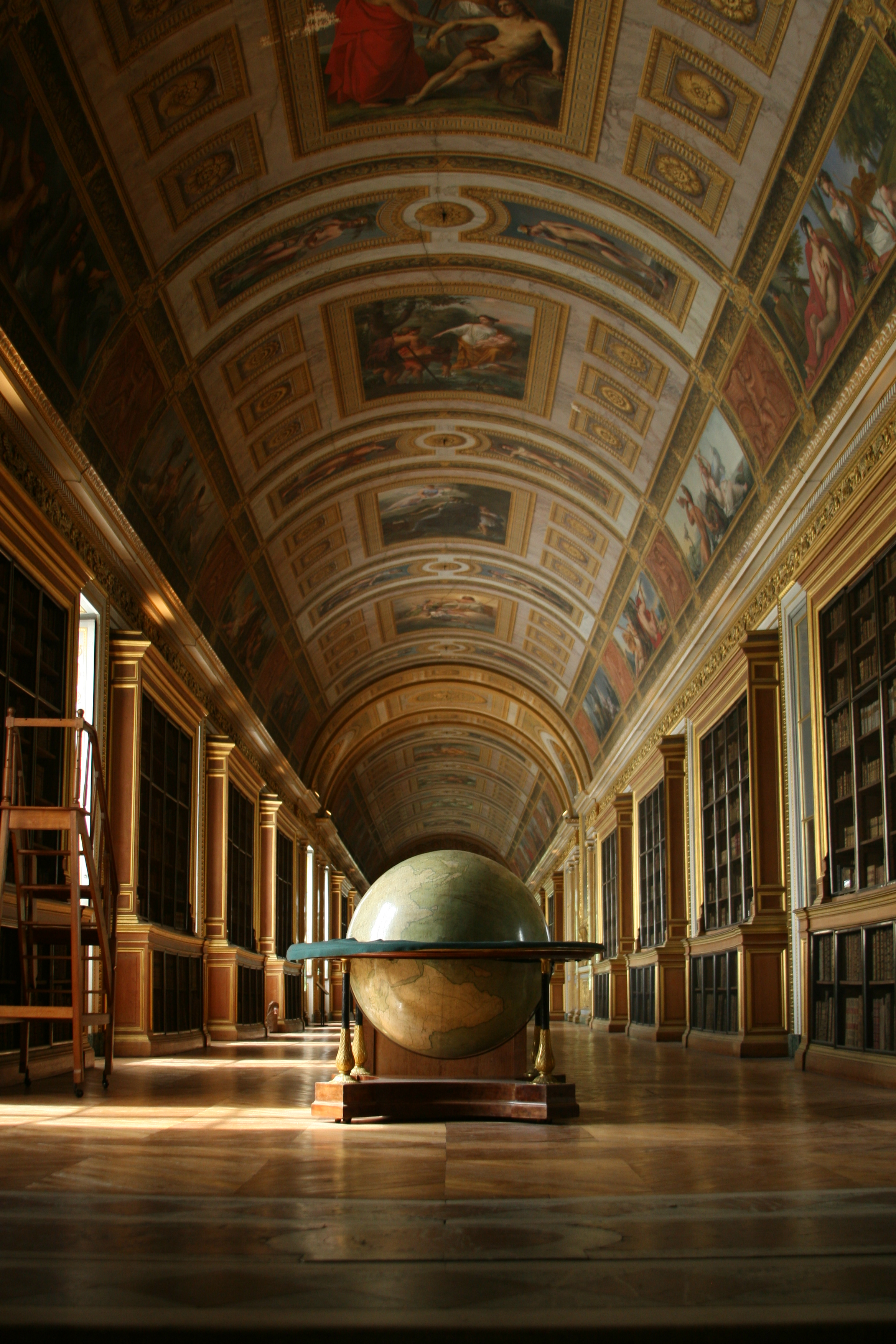 Bibliothèque du Chateau de Fontainebleau